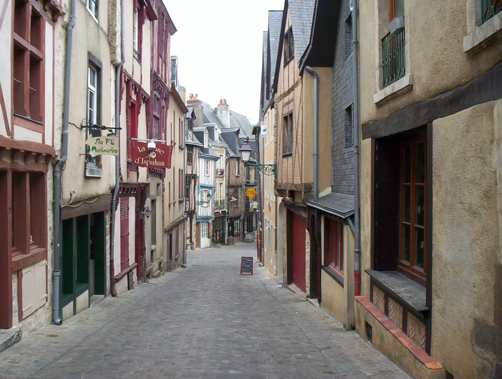 Une ruelle pittoresque du vieux Mans avec ses maisons traditionnelles. Rue des Trois-Sonnettes.